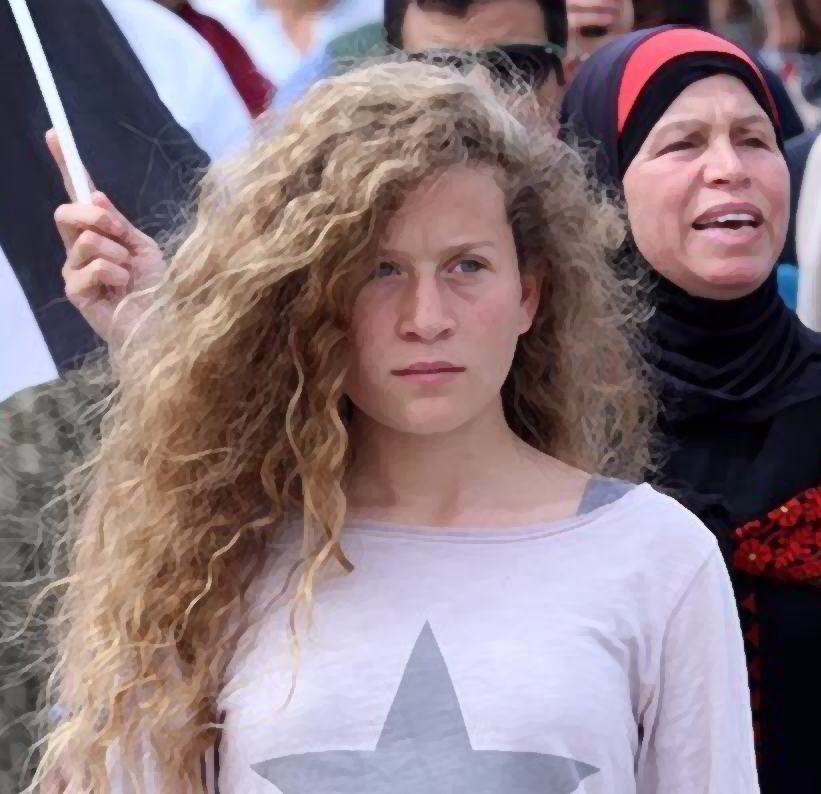 الطفلة عهد تتقدم مظاهرات الفلسطينيين بمواحهة قوات الاحتلال